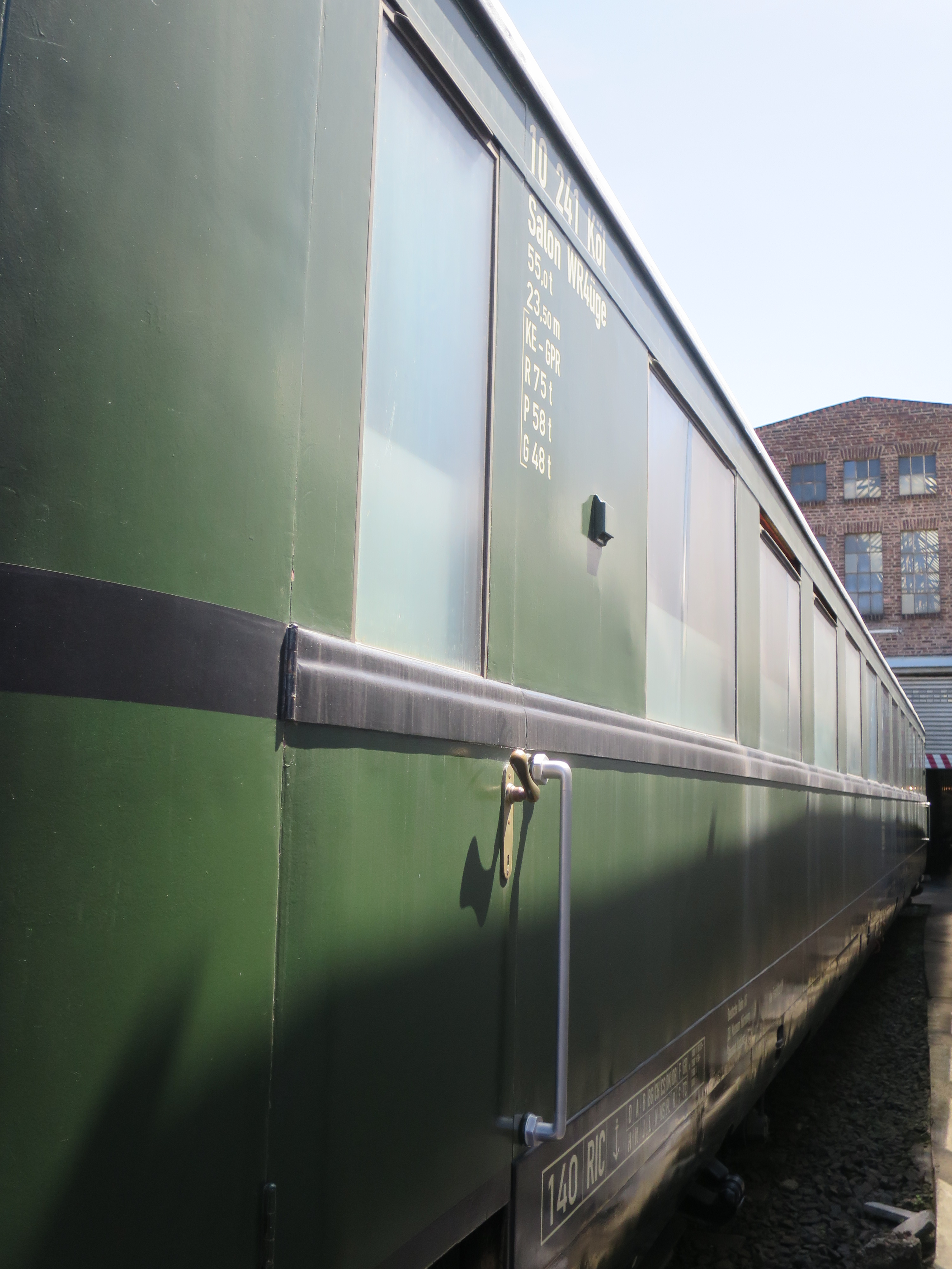 Salonspeisewagen des Sonderzuges von Hermann Göring 10 241 Bln